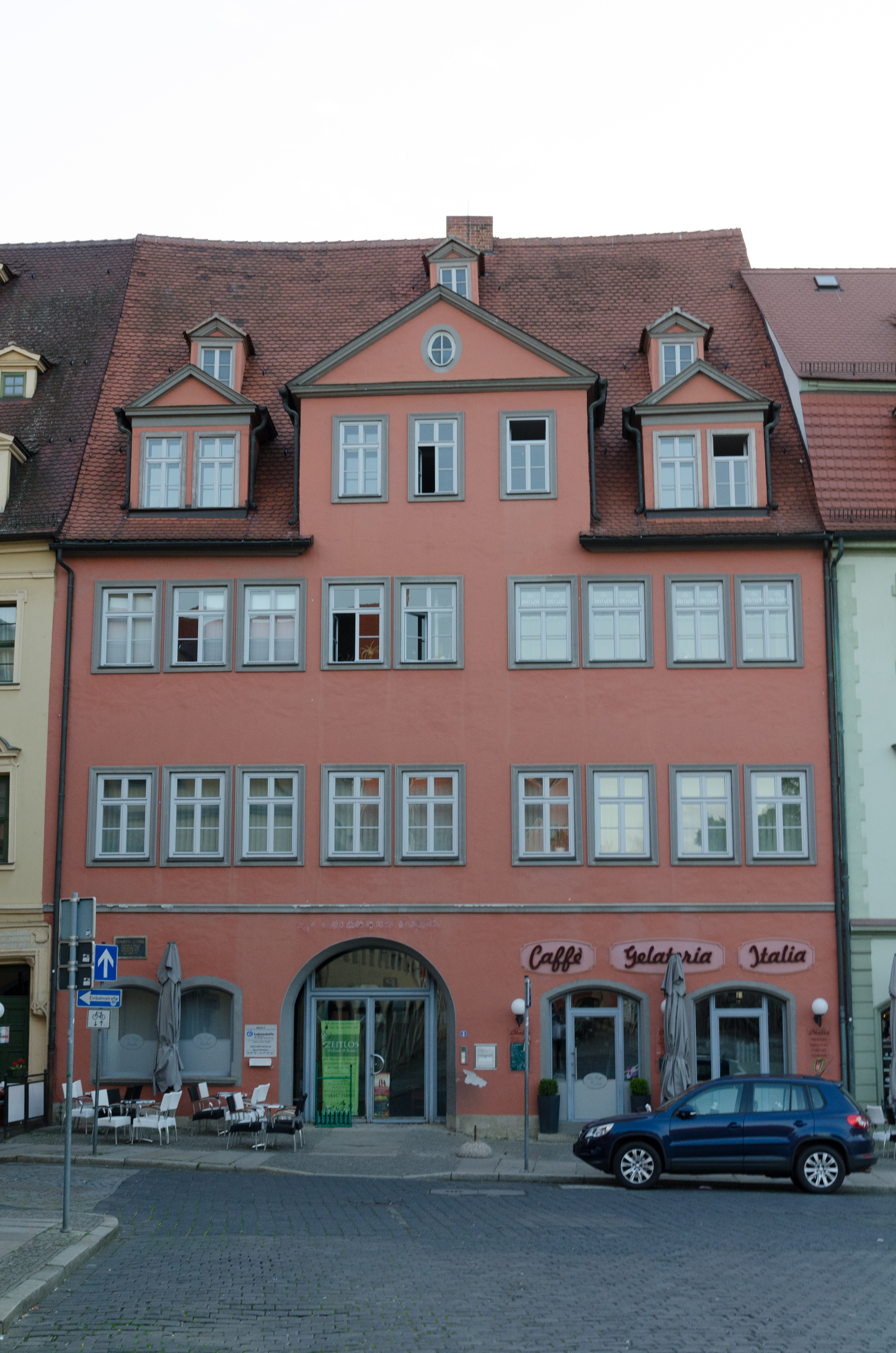 Naumburg, Markt 3